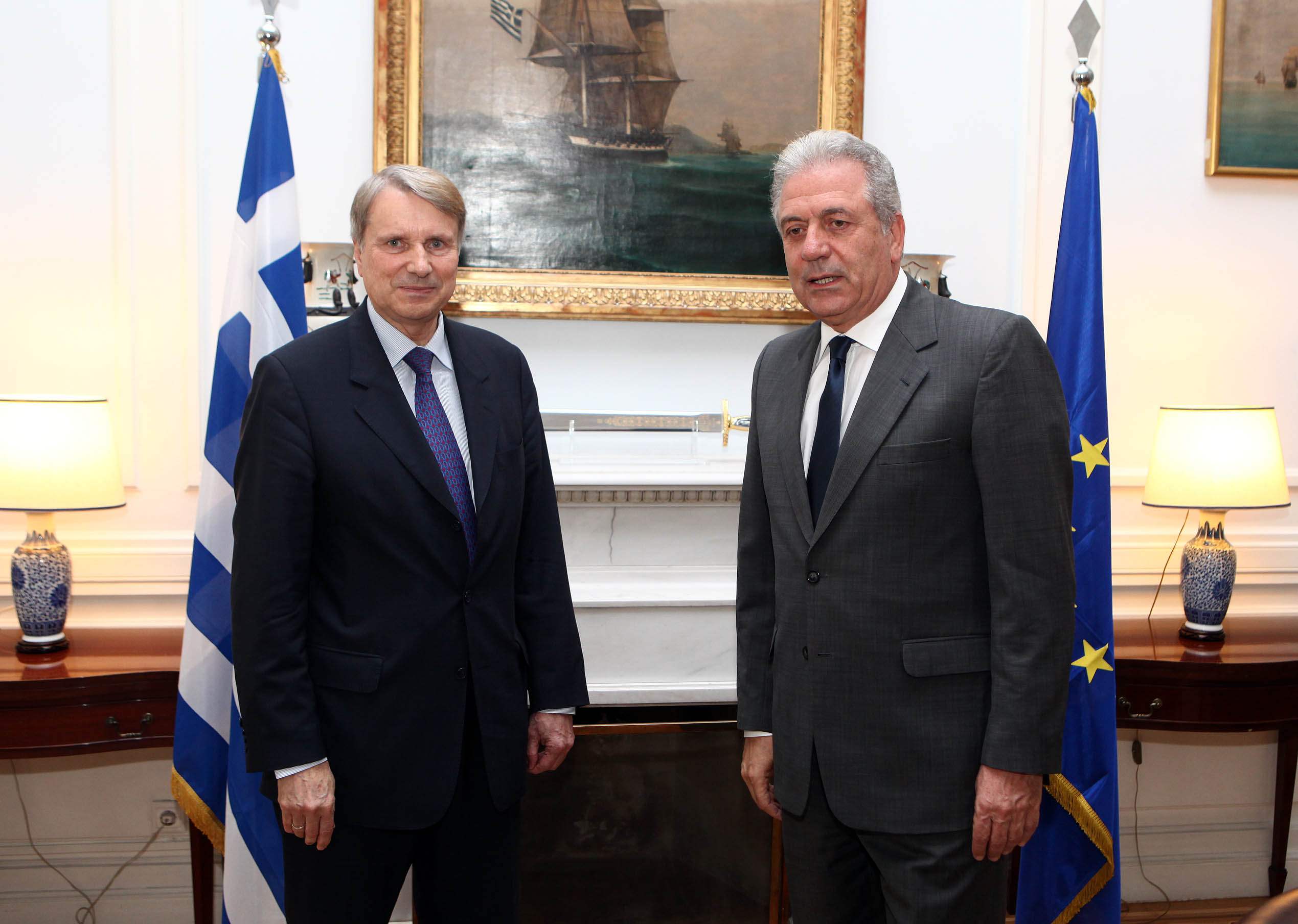 Tην Πέμπτη 5 Ιουλίου 2012, ο Υπουργός Εξωτερικών Δημήτρης Αβραμόπουλος συναντήθηκε με τον επικεφαλής της Ομάδας Δράσης για την Ελλάδα Horst Reichenbach.